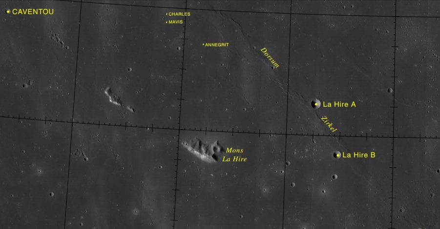 Cráteres lunares al norte del Mons La Hire. (Imagen LRO)